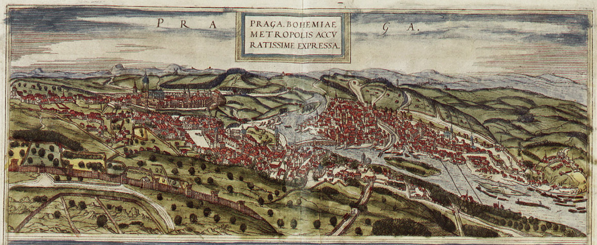 Praha